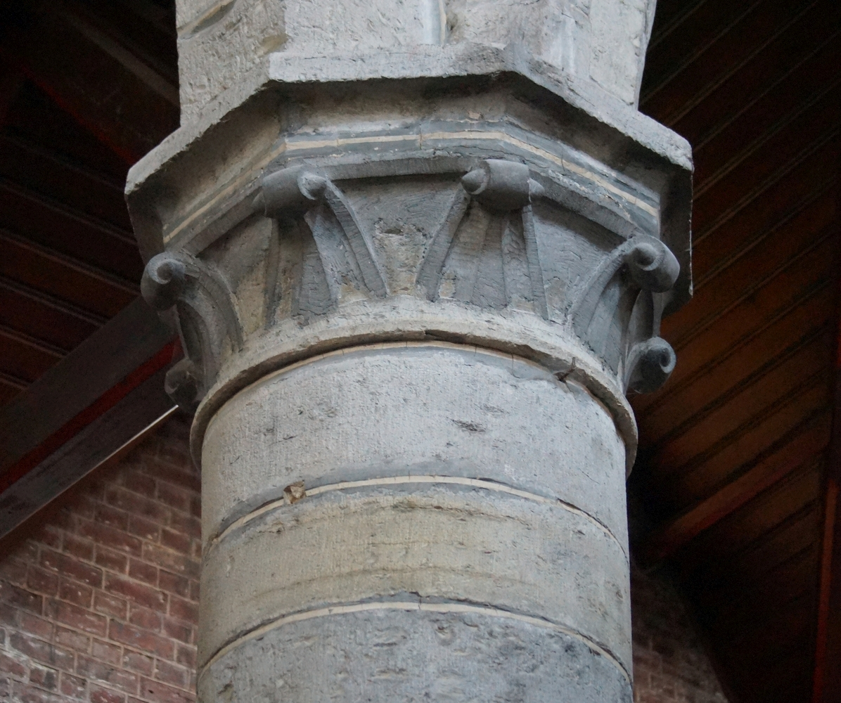 OLV Geboortekerk (Mariakerke) - Kapiteel van een pilaar in Doornikse steen.